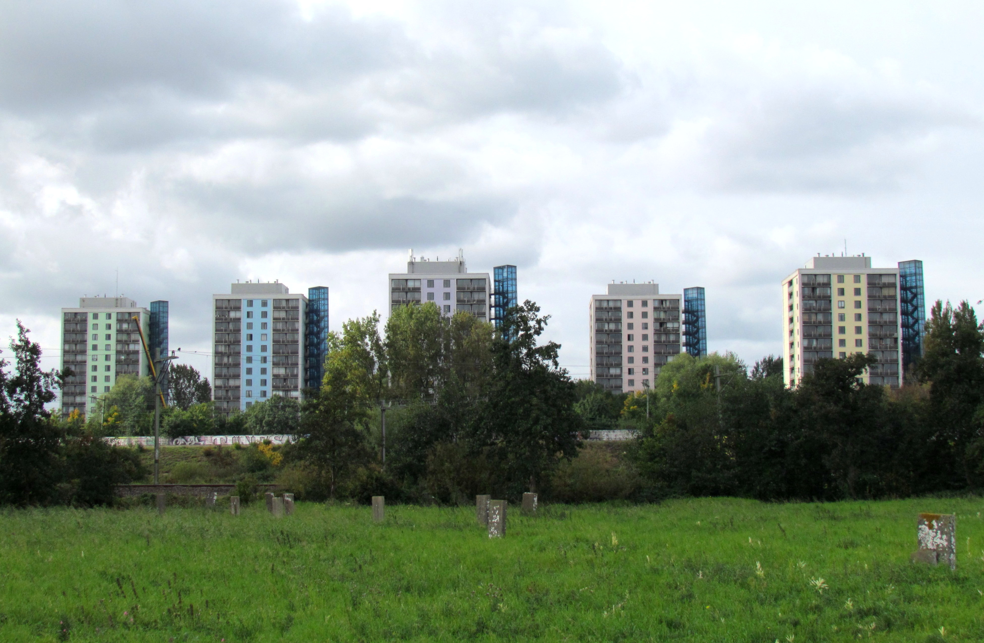 Vijf flats uit de jaren 70 te Diemen (NL), gebruikt voor studentenhuisvesting